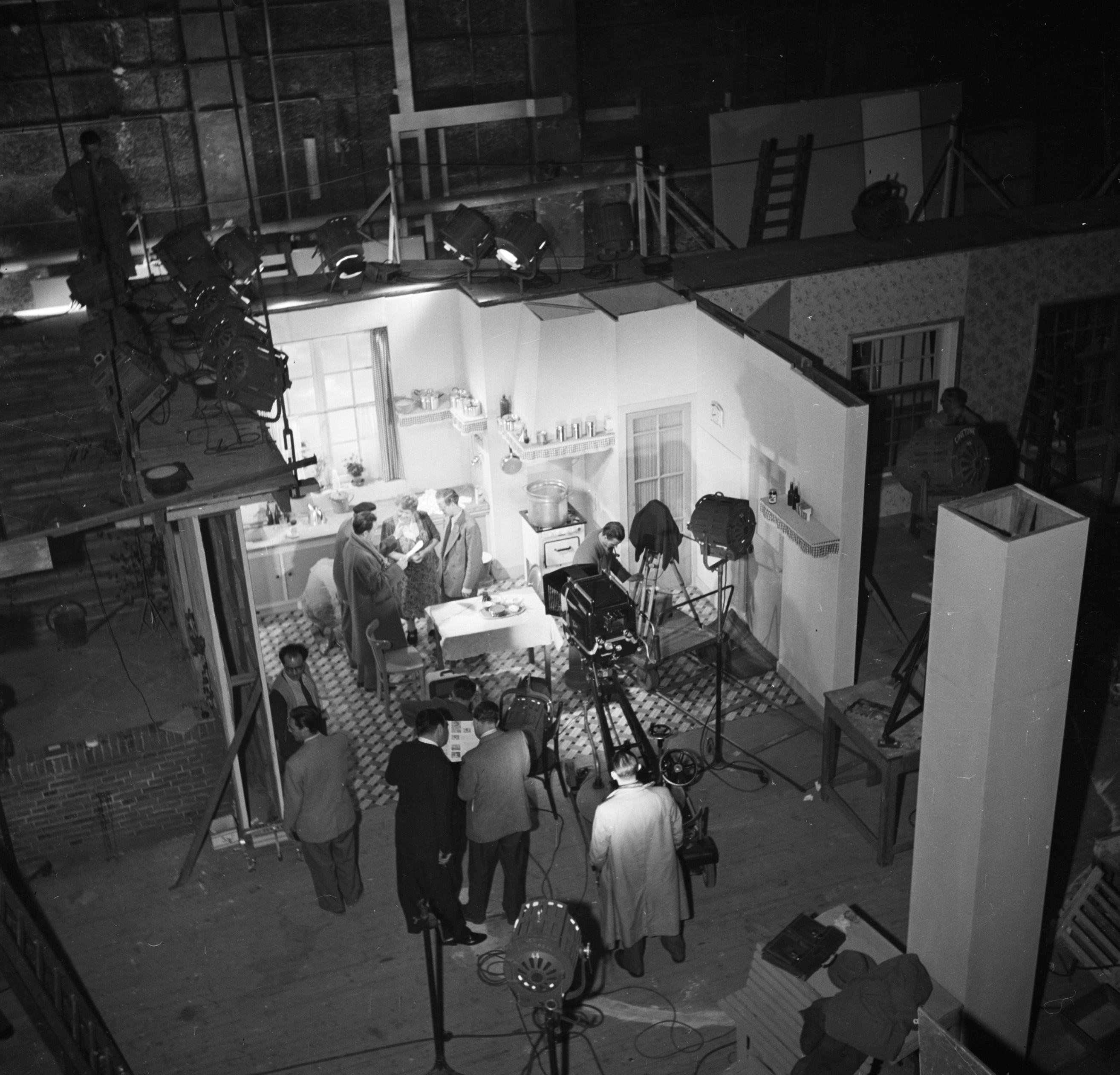 Collectie / Archief : Fotocollectie Van de Poll Reportage / Serie : [ onbekend ] Beschrijving : Atelier Cinetone-Omo bij het maken van de film 'Sterren Stralen Overal', onder regie van Gerard Rutten Datum : 10 december 1953 Locatie : Amsterdam, Noord-Holland Trefwoorden : ateliers, cineasten, films Fotograaf : Poll, Willem van de, [onbekend] Auteursrechthebbende : Nationaal Archief Materiaalsoort : Negatief (6x6) Nummer archiefinventaris : bekijk toegang 2.24.14.02 Bestanddeelnummer : 254-2404